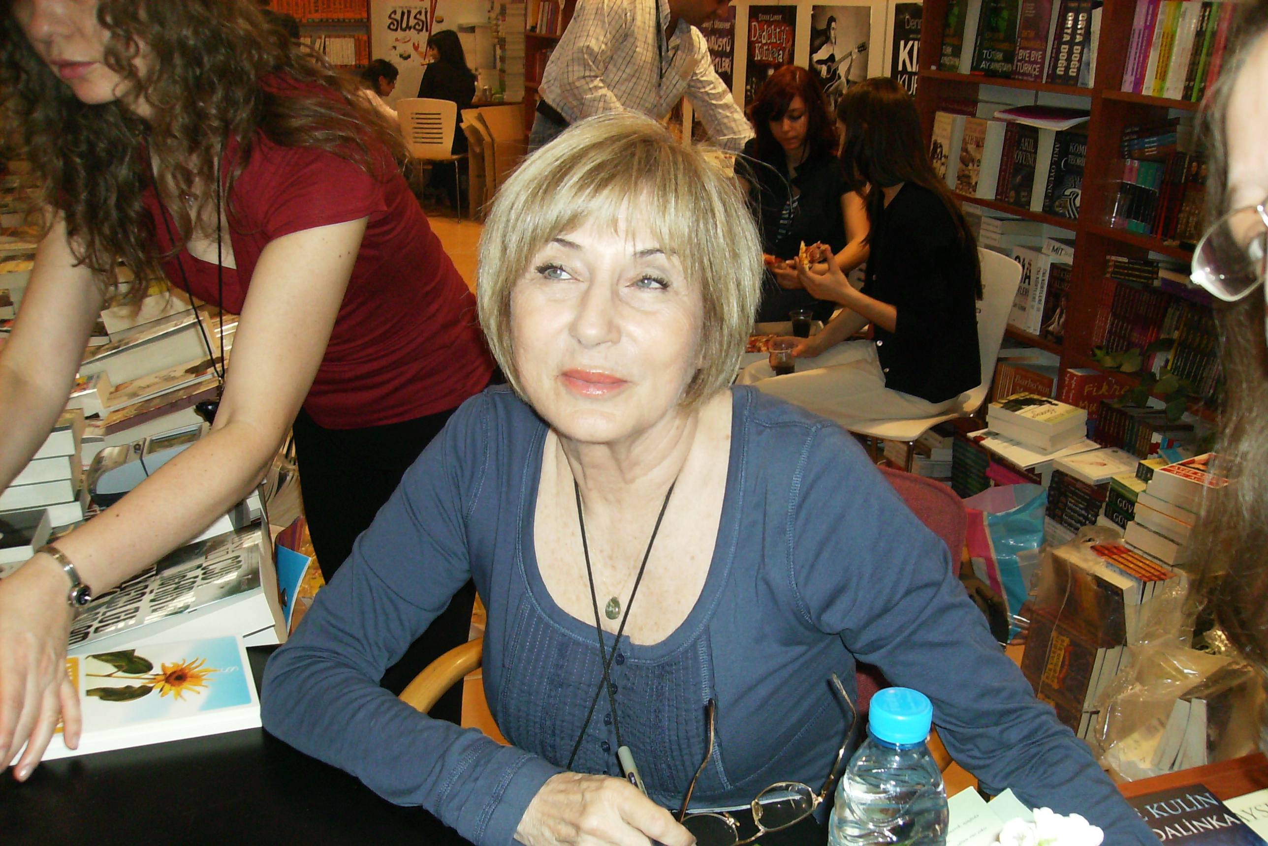 kendi çekimim 13.izmir kitap fuarı